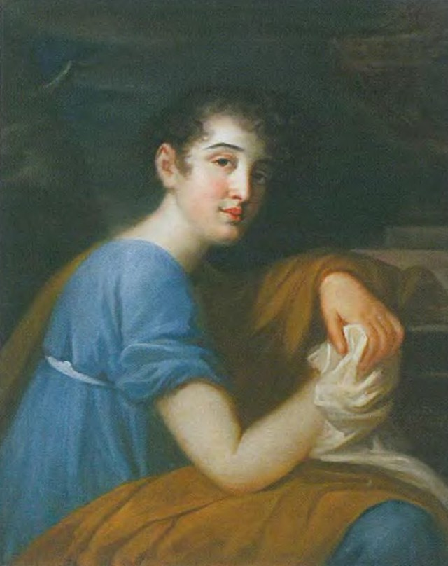 Портрет неизвестной из рода Глебовых-Стрешневых (Анна Васильевна Глебова-Стрешнева, ур. Друцкая-Соколинская (1785 – ?), во втором браке Лесли).